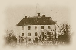 Gefle Slott